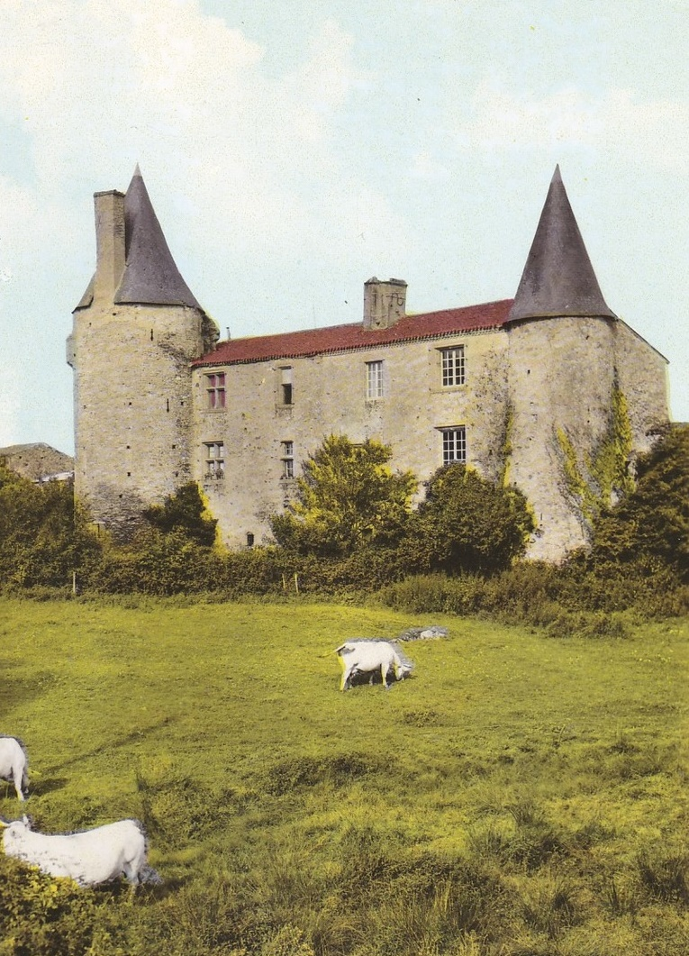 photo ancienne château de la Grêve